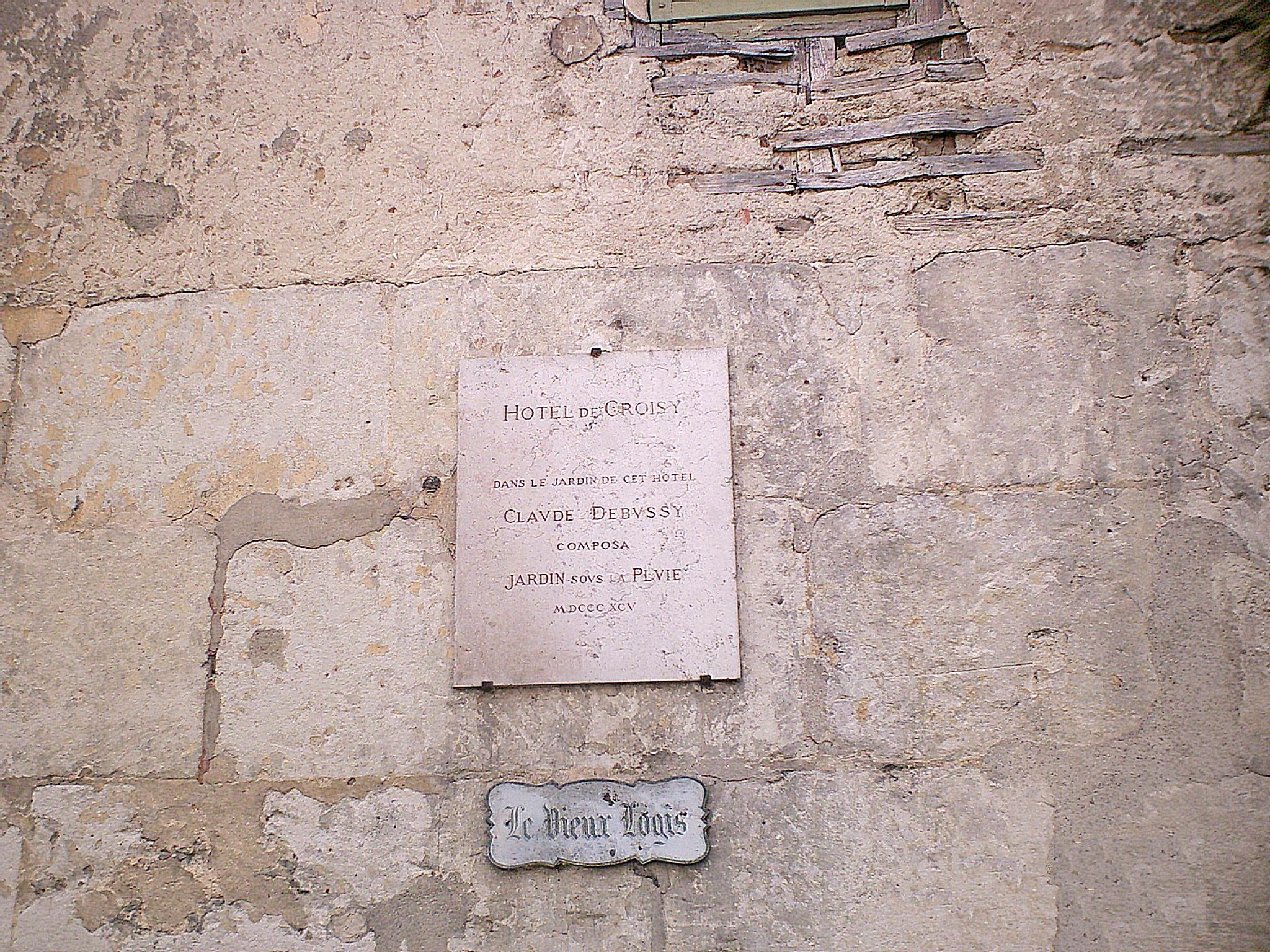 Plaque sur la la façade de l'Hotel de Croisy à Orbec (Calvados)